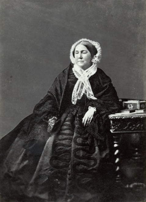 Графиня Бобринская София Прокофьевна (1812-1869), урожденная Соковнина